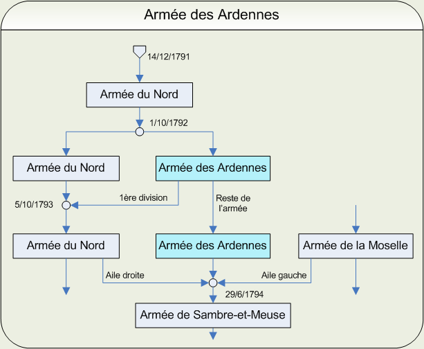 Ordinogramme de l'armée des Ardennes Dessin réalisé par Papier K